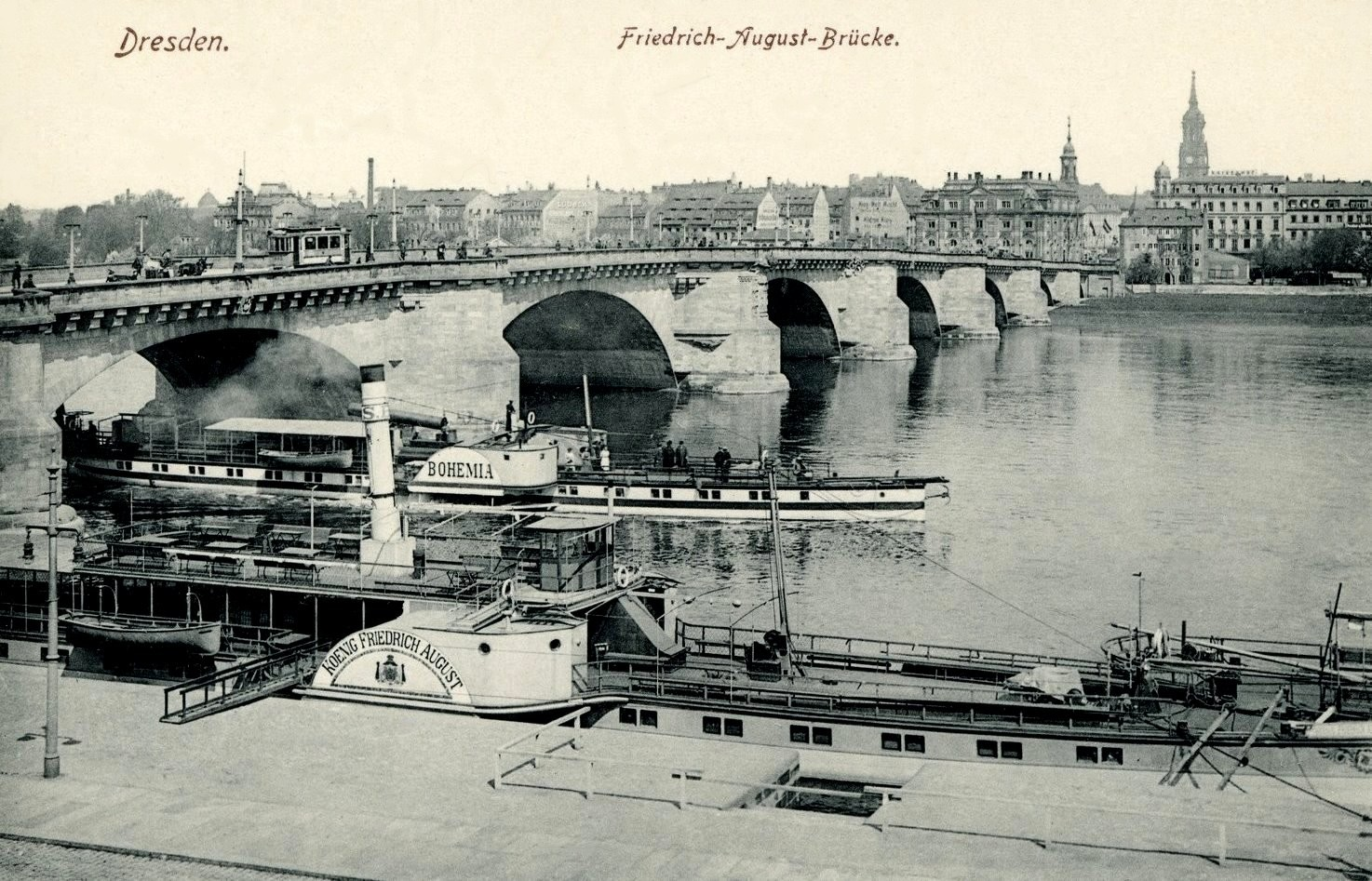 Dresden; Friedrich-August-Brücke, Elbe mit Dampfer Bohemia This postcard is from publisher Brück & Sohn in Meißen ( postcard has a unique number 18905 and is available in a higher resolution at the publisher. This images was uploaded in a cooperation project between Wikipedians and the publisher.